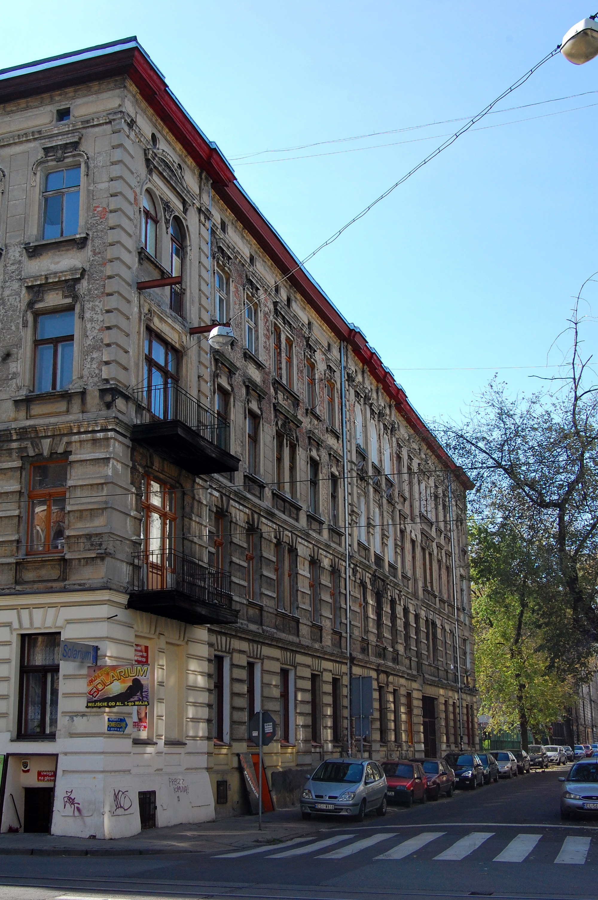 Łódź, ul. 1 Maja 8